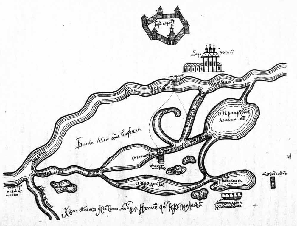 Чертеж поймы реки Воронеж с изображением воронежской крепости и Успенского монастыря. историческая хроника: 1694 год